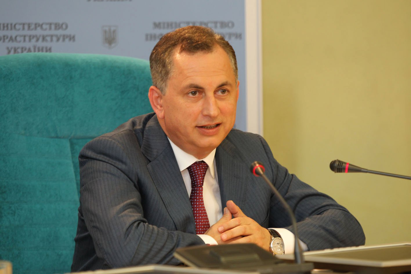 На звітній конференції. Міністерство інфраструктури України, м. Київ